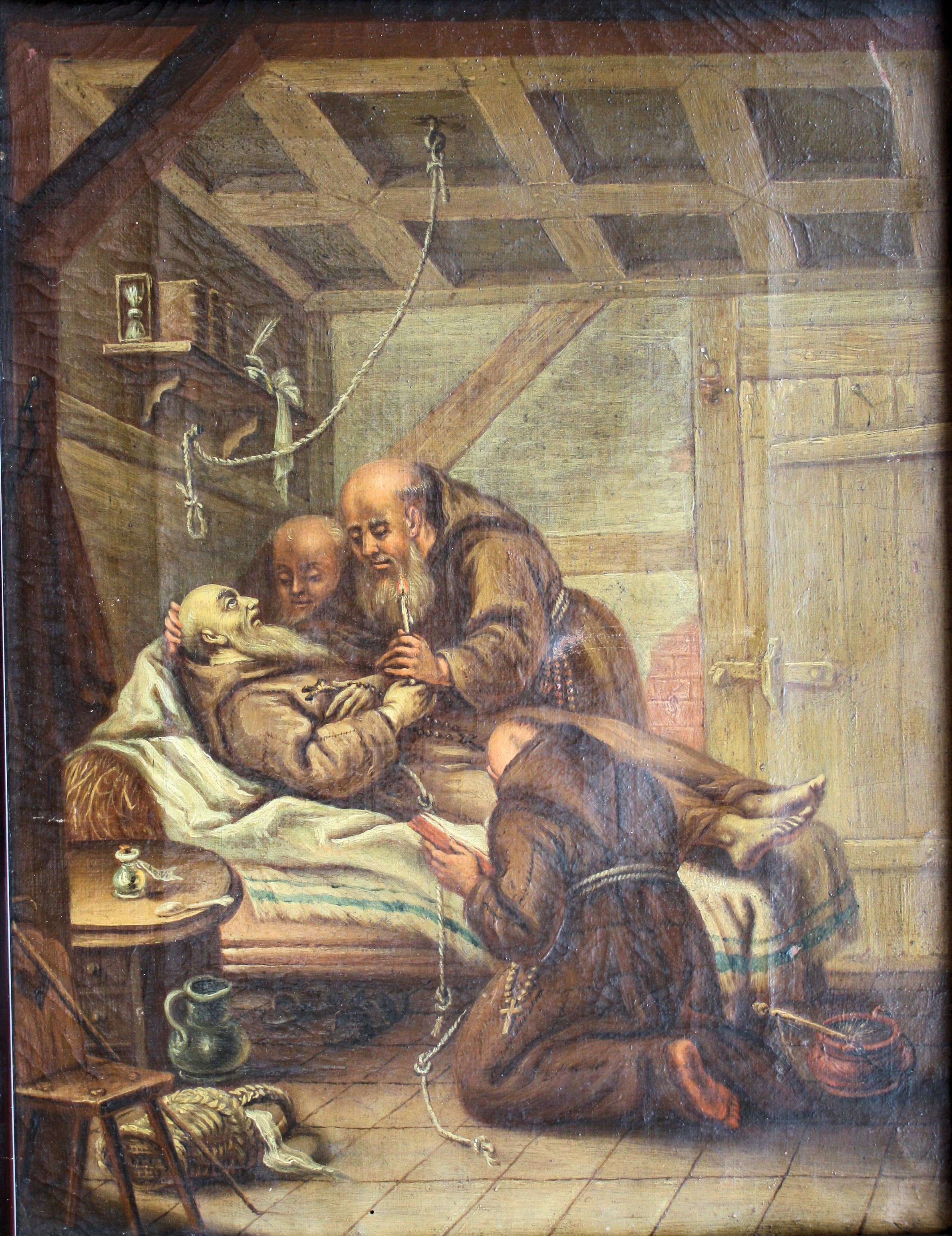 Bonaventura von Andelfingen. Tod eines Kapuziners in seiner Klosterzelle. Signatur (auf dem Schrägbalken links oben): Bonaventura von Andelfingen, Capuz. pinxit 1781. Rückseitig Provenienzvermerk des Kapuzinerklosters Waldshut. Heutiger Standort: Museum Alte Metzig Waldshut